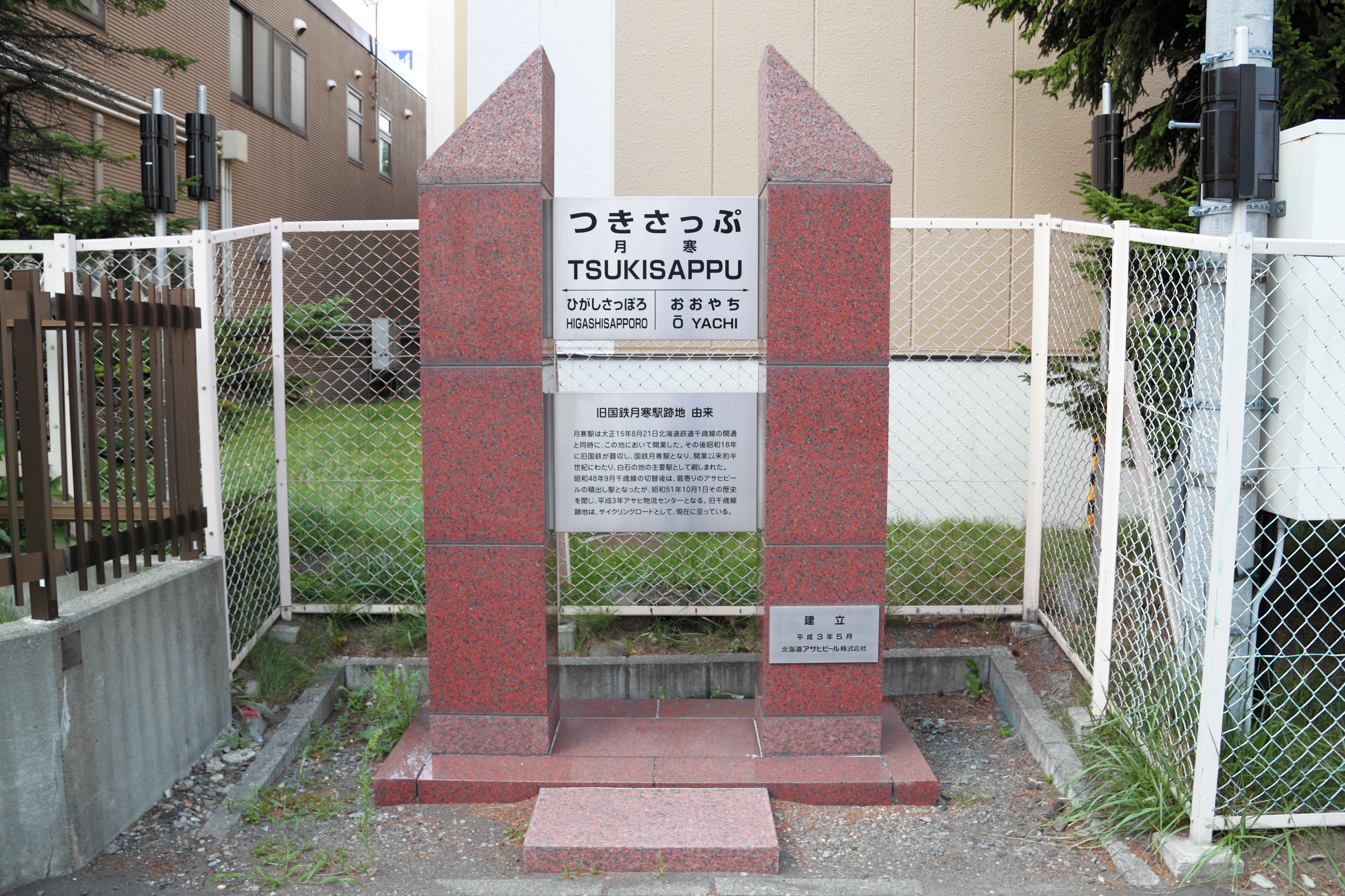 国鉄千歳線月寒駅跡にある記念碑。